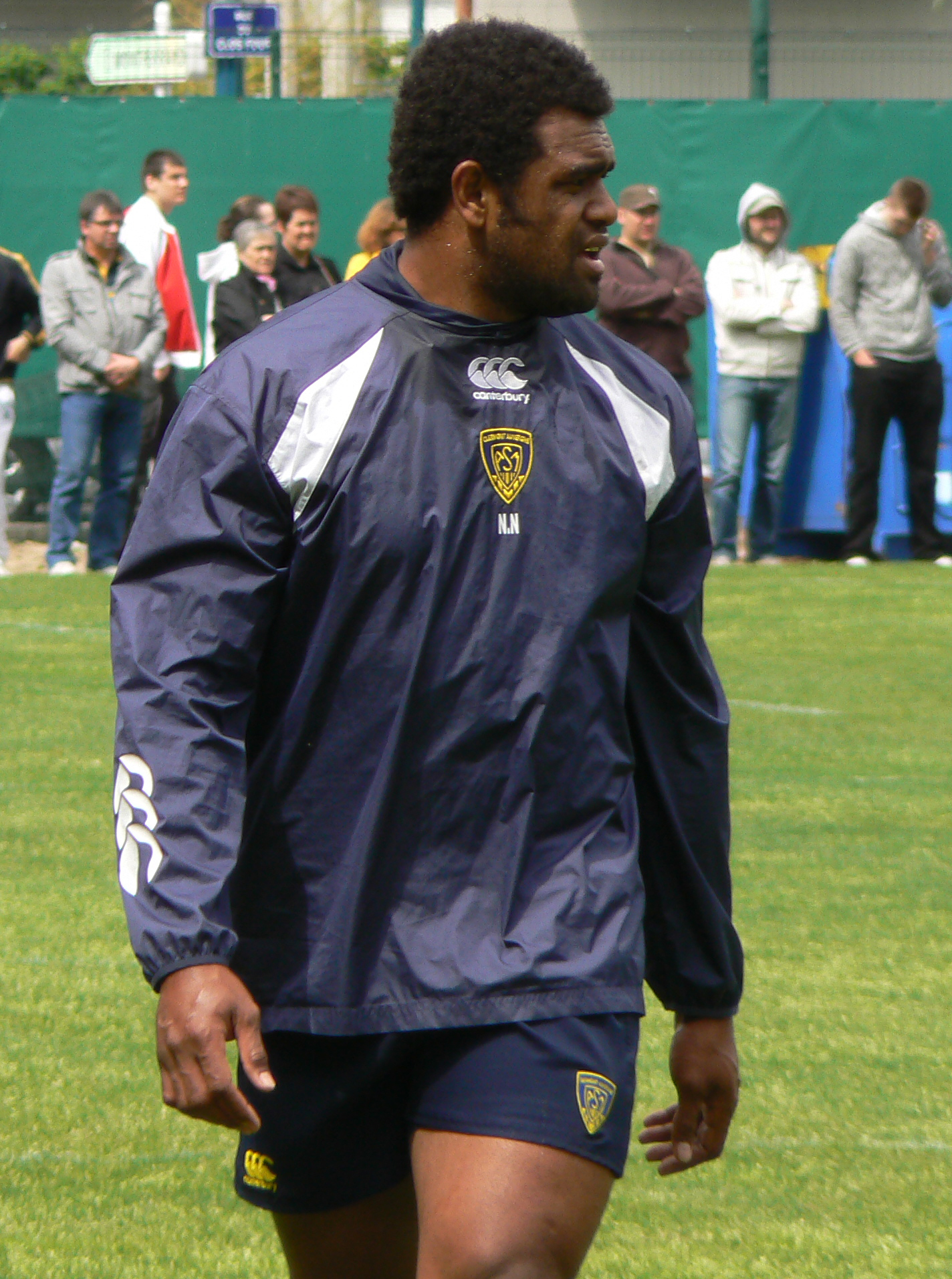 Le rugbyman international fidjien Napolioni Nalaga lors d'un entraînement avec l'ASM Clermont Auvergne